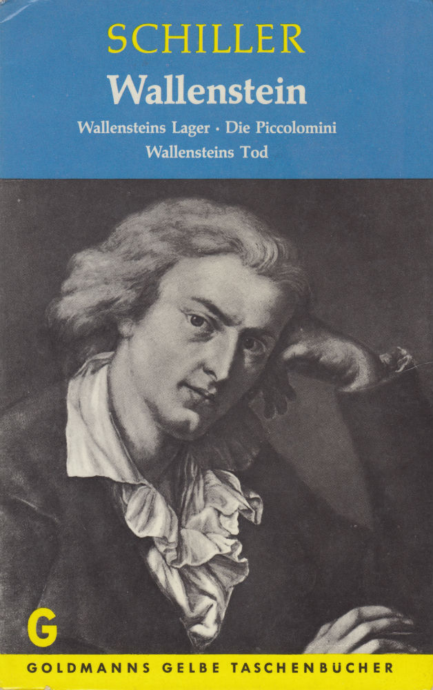 Friedrich Schiller: Wallenstein. Wilhelm Goldmann Verlag, München 1972. DNB